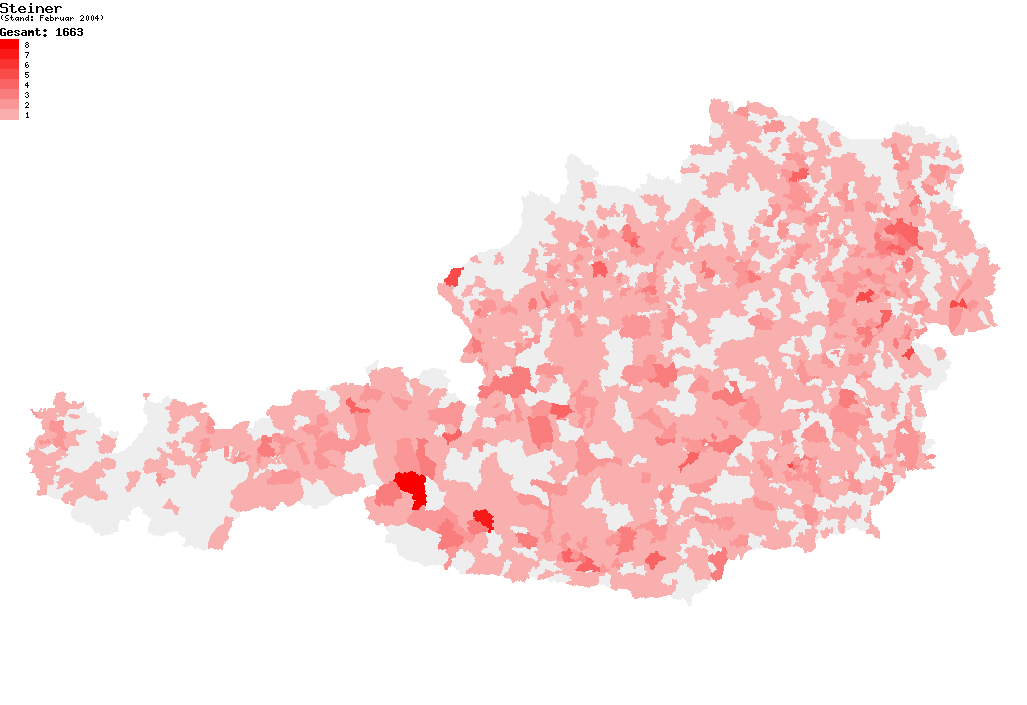 Verteilung des Nachnamens Steiner in Österreich nach dem Telefonbuch mit Stand vom Februar 2004